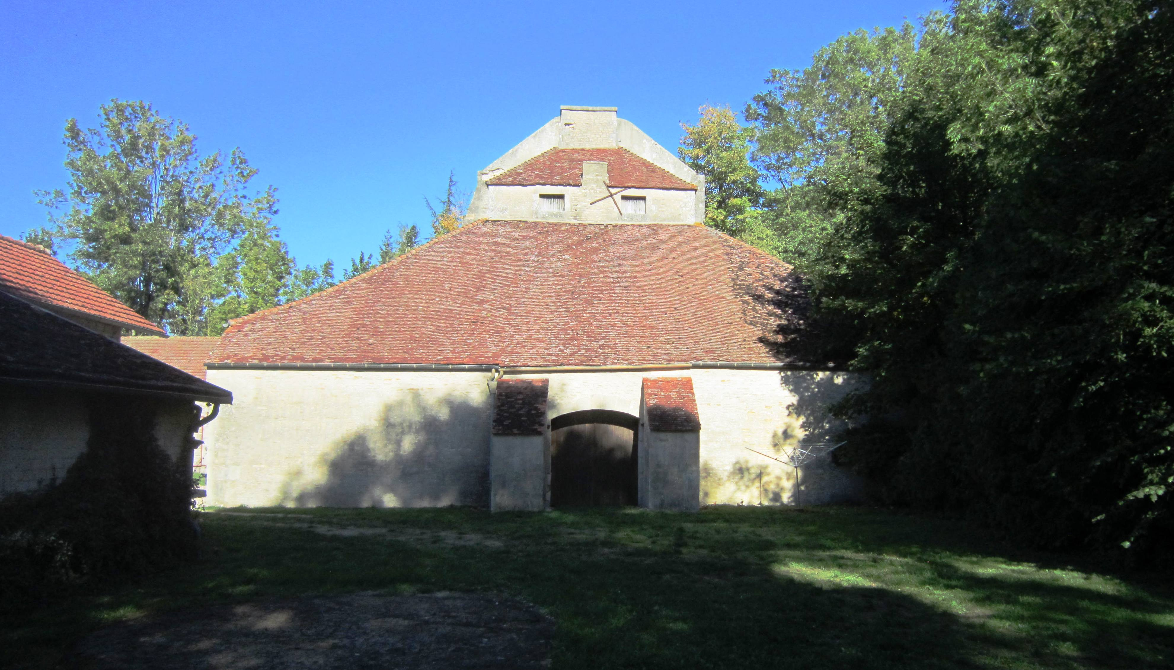 Ancienne forge d'Ampilly-le-Sec (Côte-d'Or)